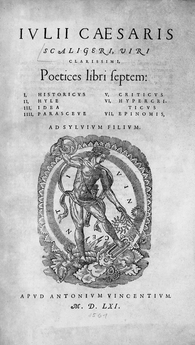 Julius Caesar Scaliger: Poetices libri septem. Ad Sylvium filium, (Lyon), A. Vincentius, 1561